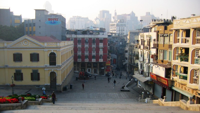 耶穌會紀念廣場。